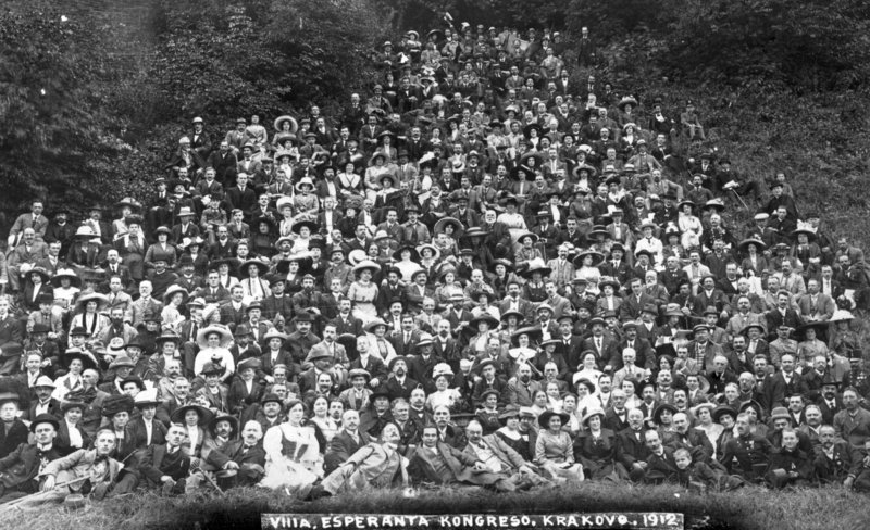 Komuna foto de ekskursanoj dum la 8-a Universala Kongreso, 1912